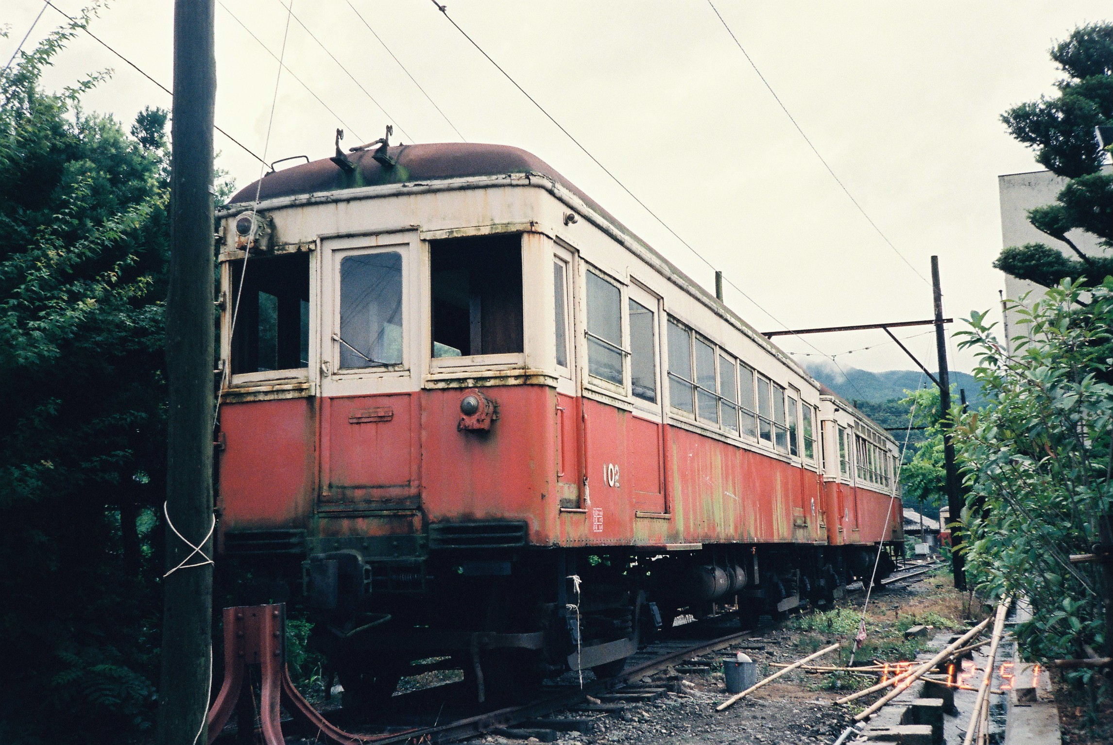 登山口駅の引き上げ線に留置されていた野上電気鉄道クハ100形